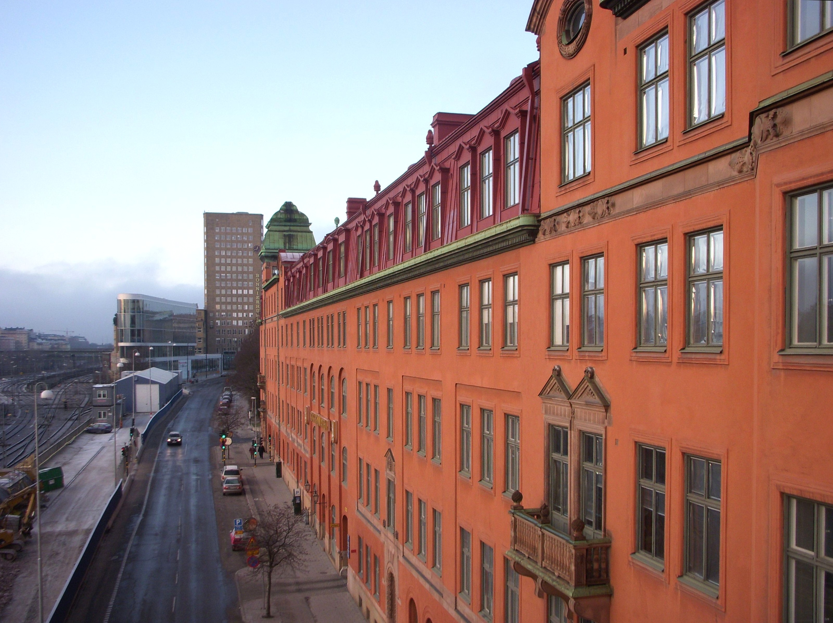 Torsgatan på Norrmalm i Stockholm, byggnaden t.h. är Stockholm Vattens huvudkontor, ritad av Ferdinand Boberg.